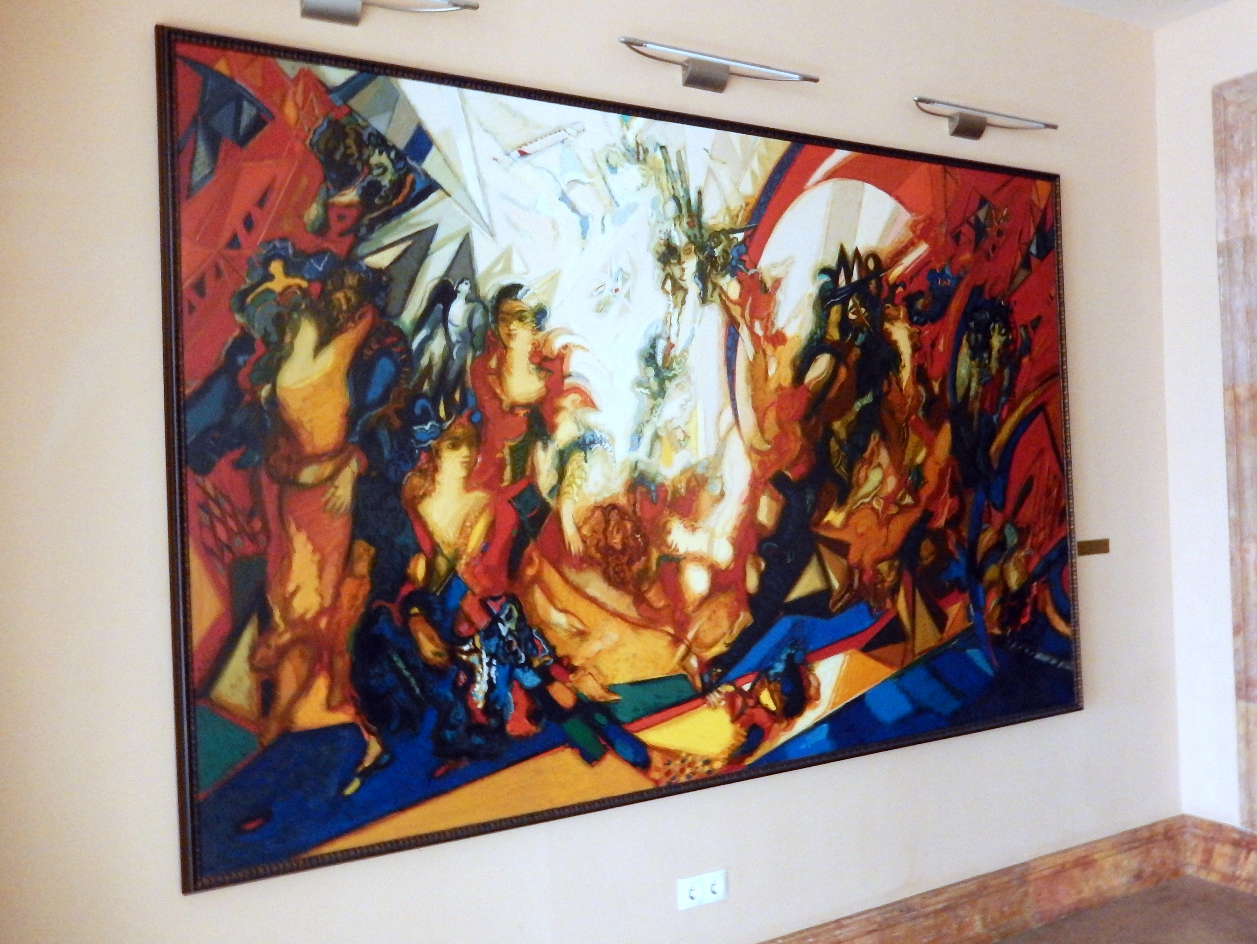 «Արշիլ Գորկու հիշատակին», 2003